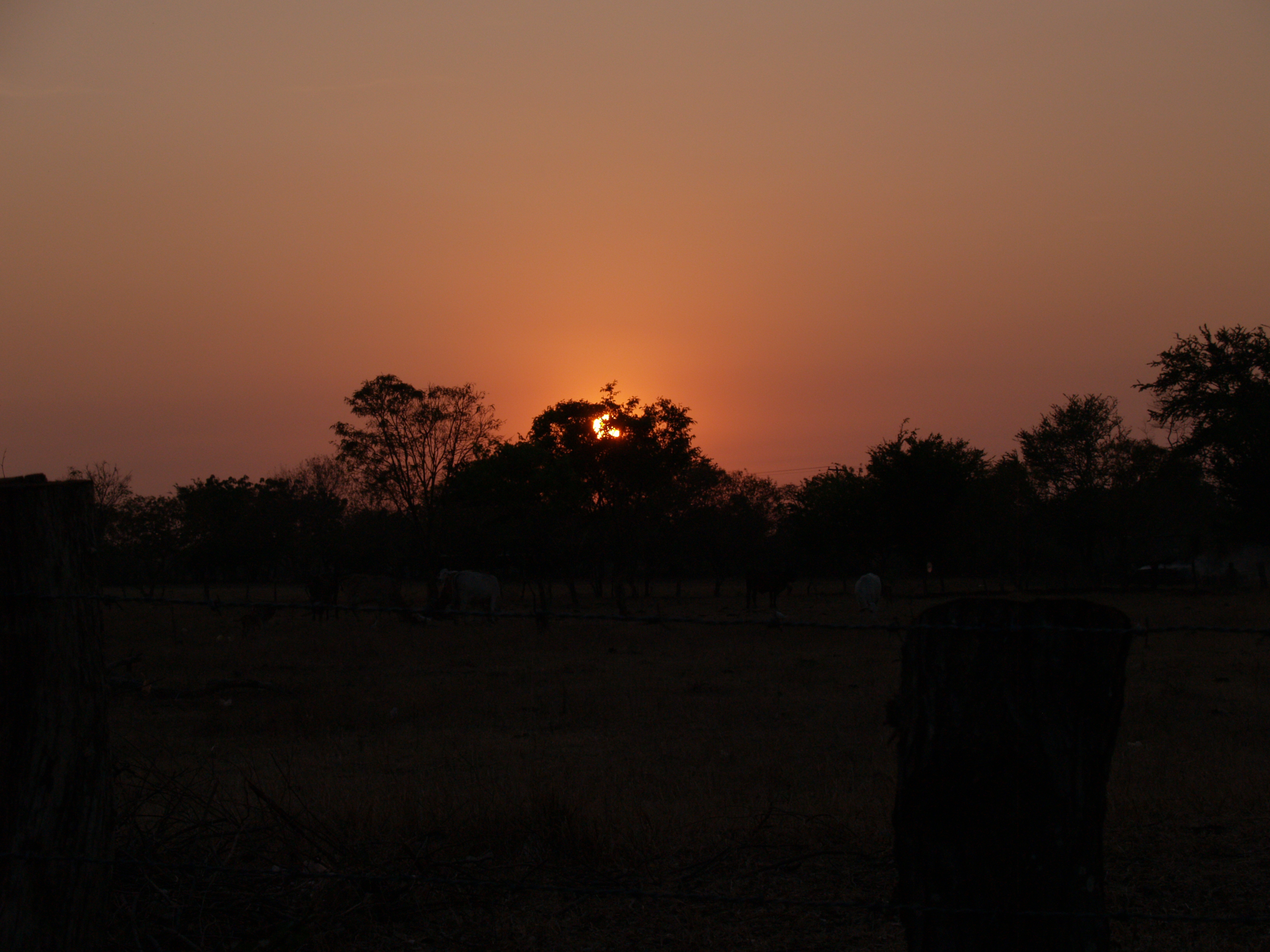 Atardecer en Nagarote.